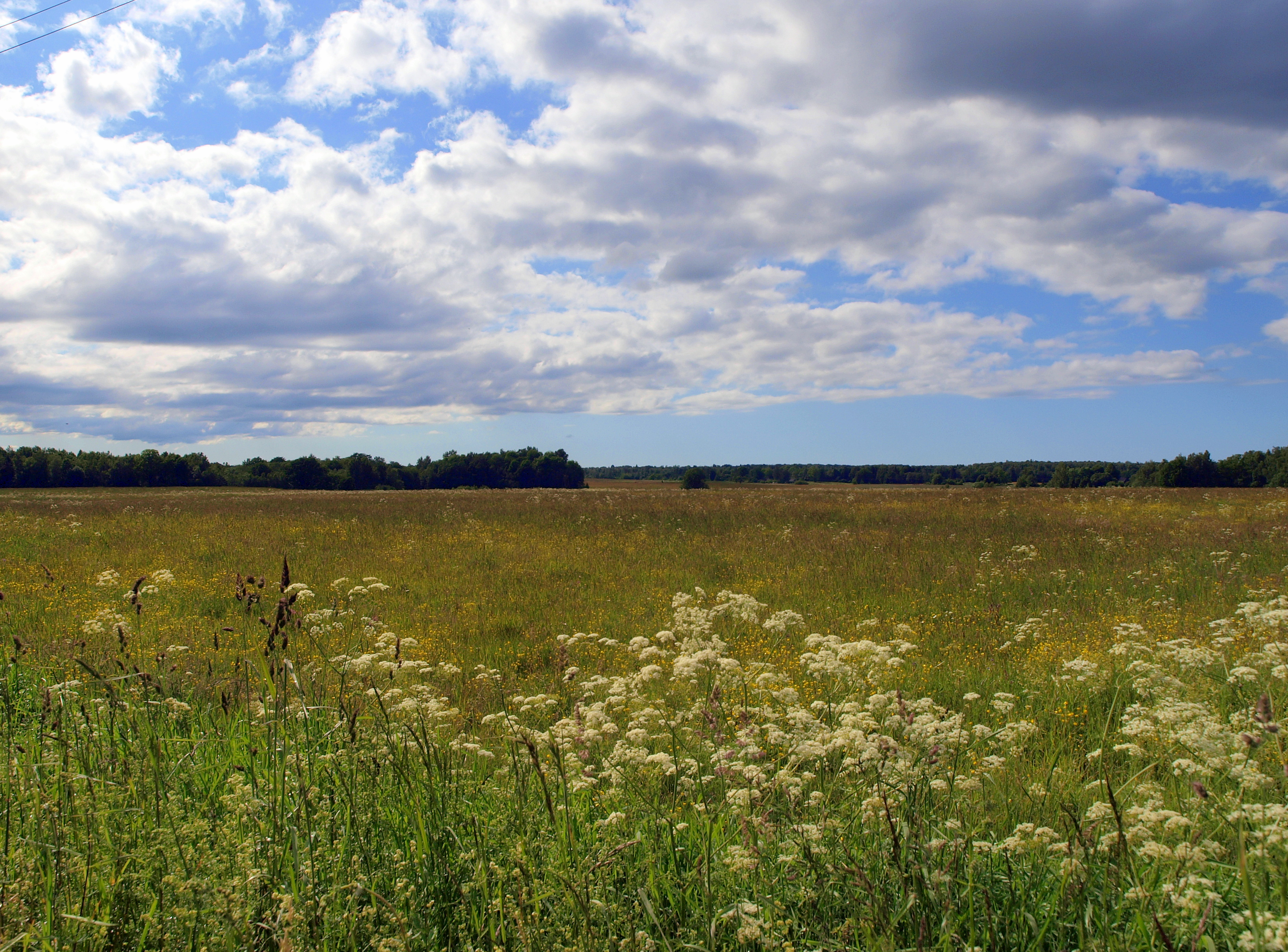 Latvia, near Dundaga